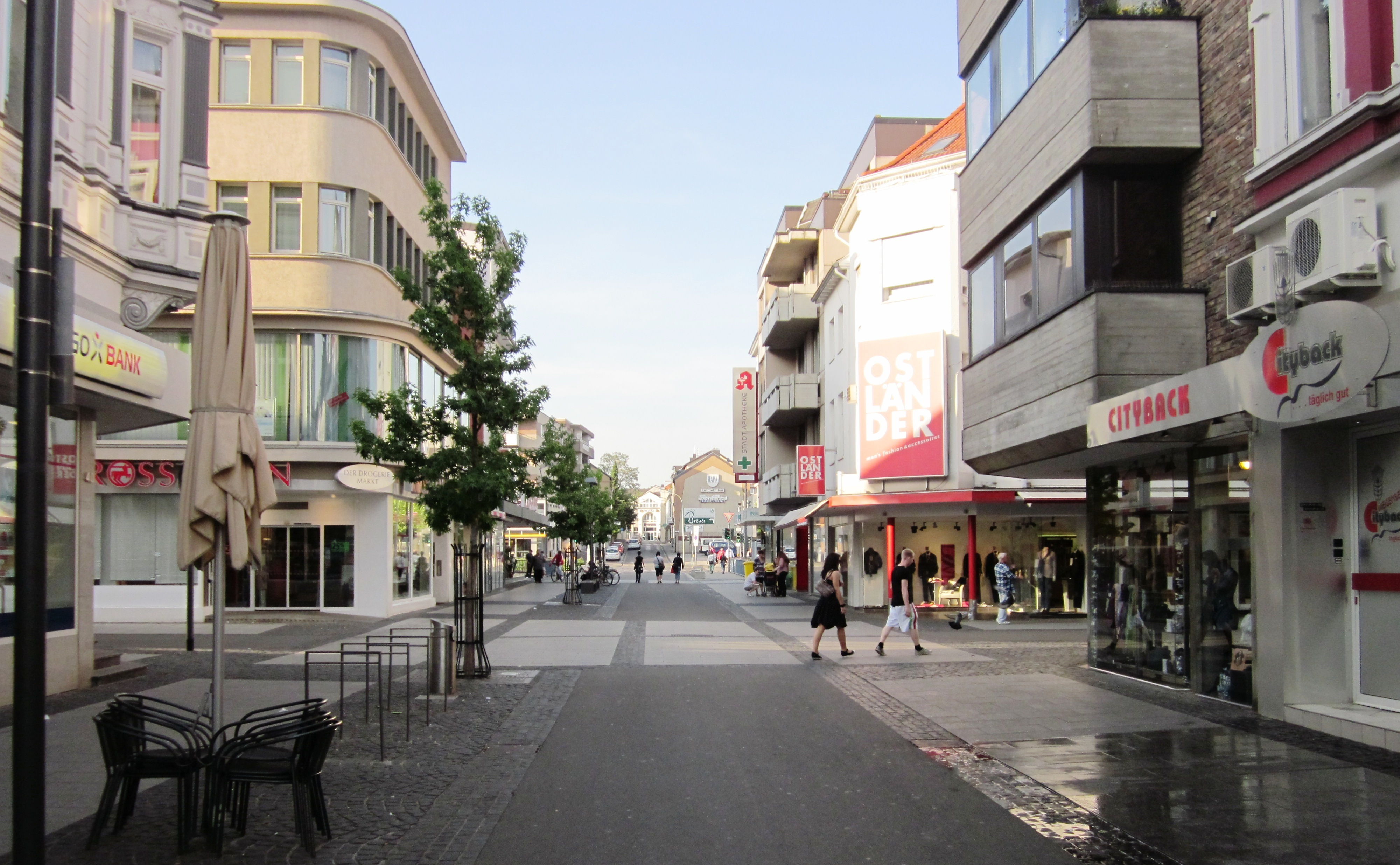 Neuer Teil der Grabenstraße im Vordergrund und älterer Teil der Grabenstraße im Hintergrund in der Eschweiler Südstadt in Nordrhein-Westfalen